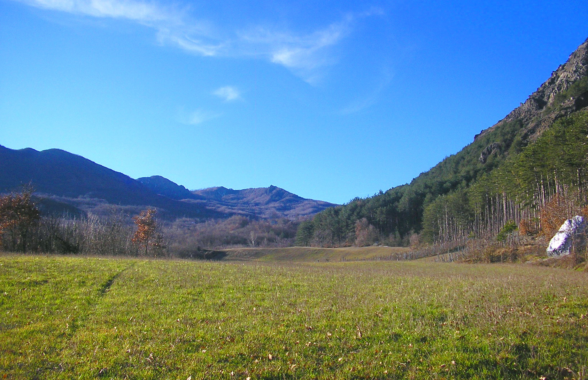 Boioli di Perino, a destra Monte Armelio